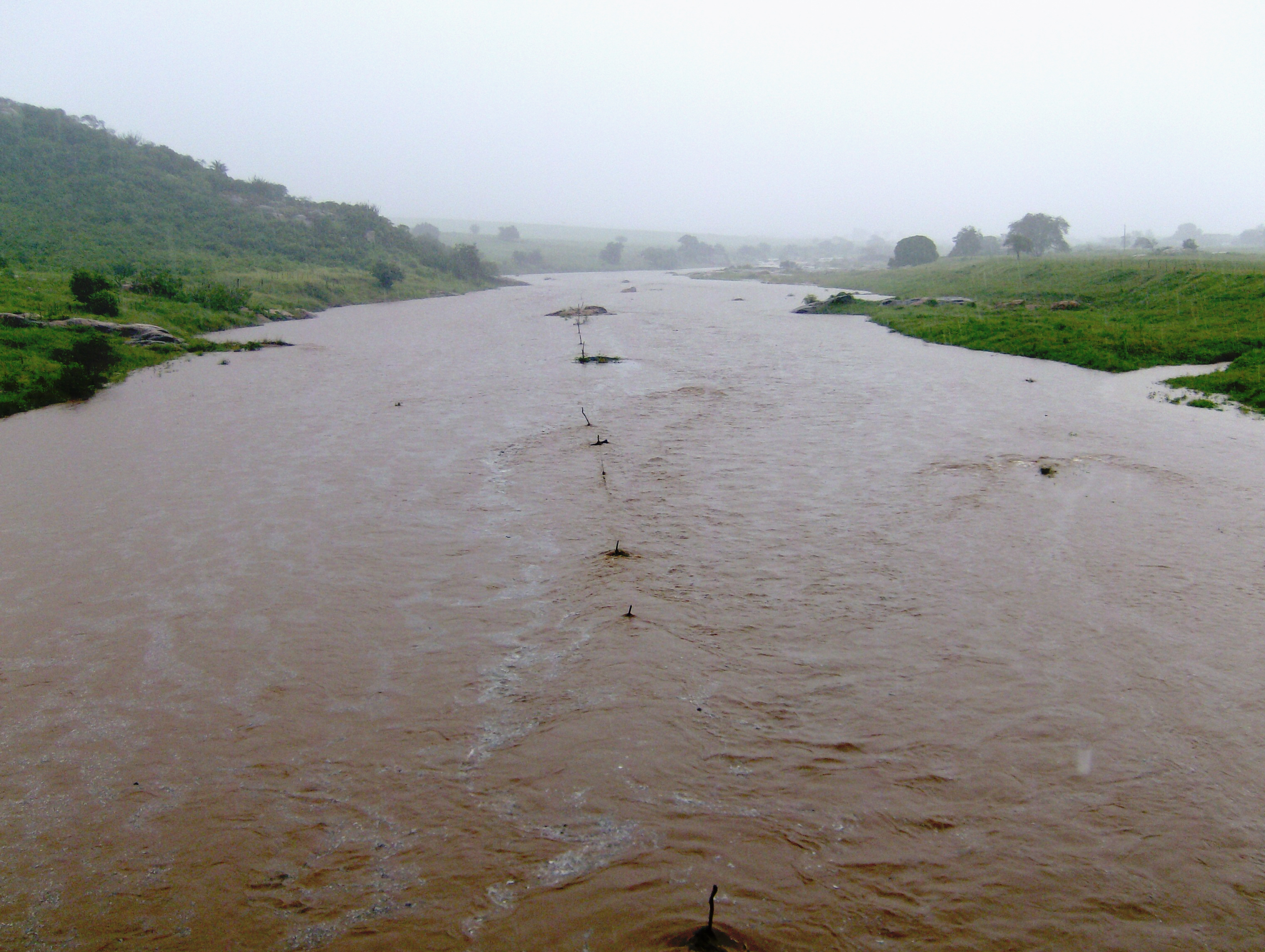 Rio Curimataú. Banha os estados da Paraíba e o Rio Grande do Norte